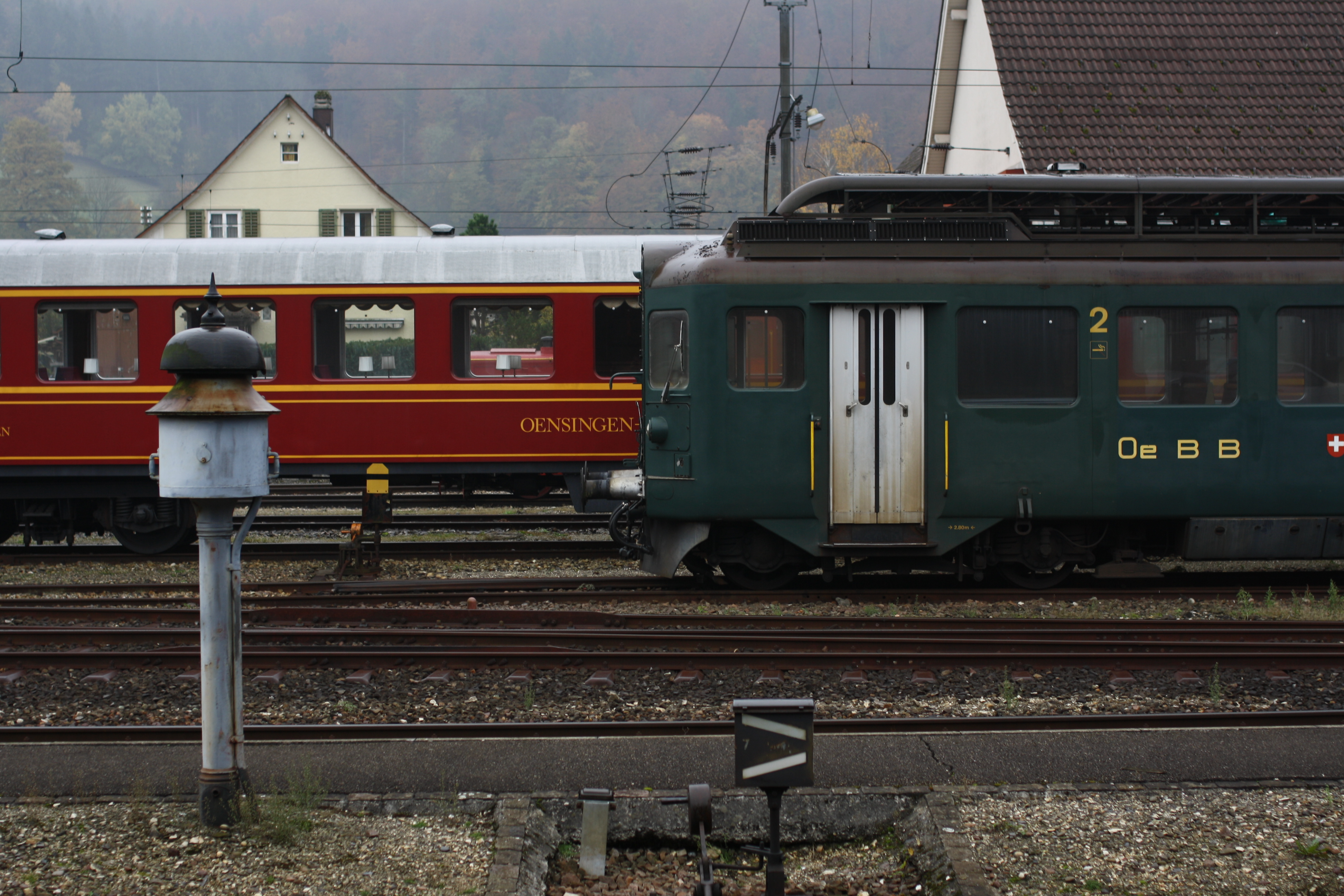 Läutewerk im Bahnhof Balsthal